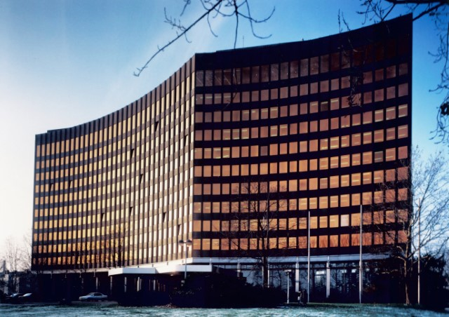 ehemaliges BDI-Hauptgebäude in Köln